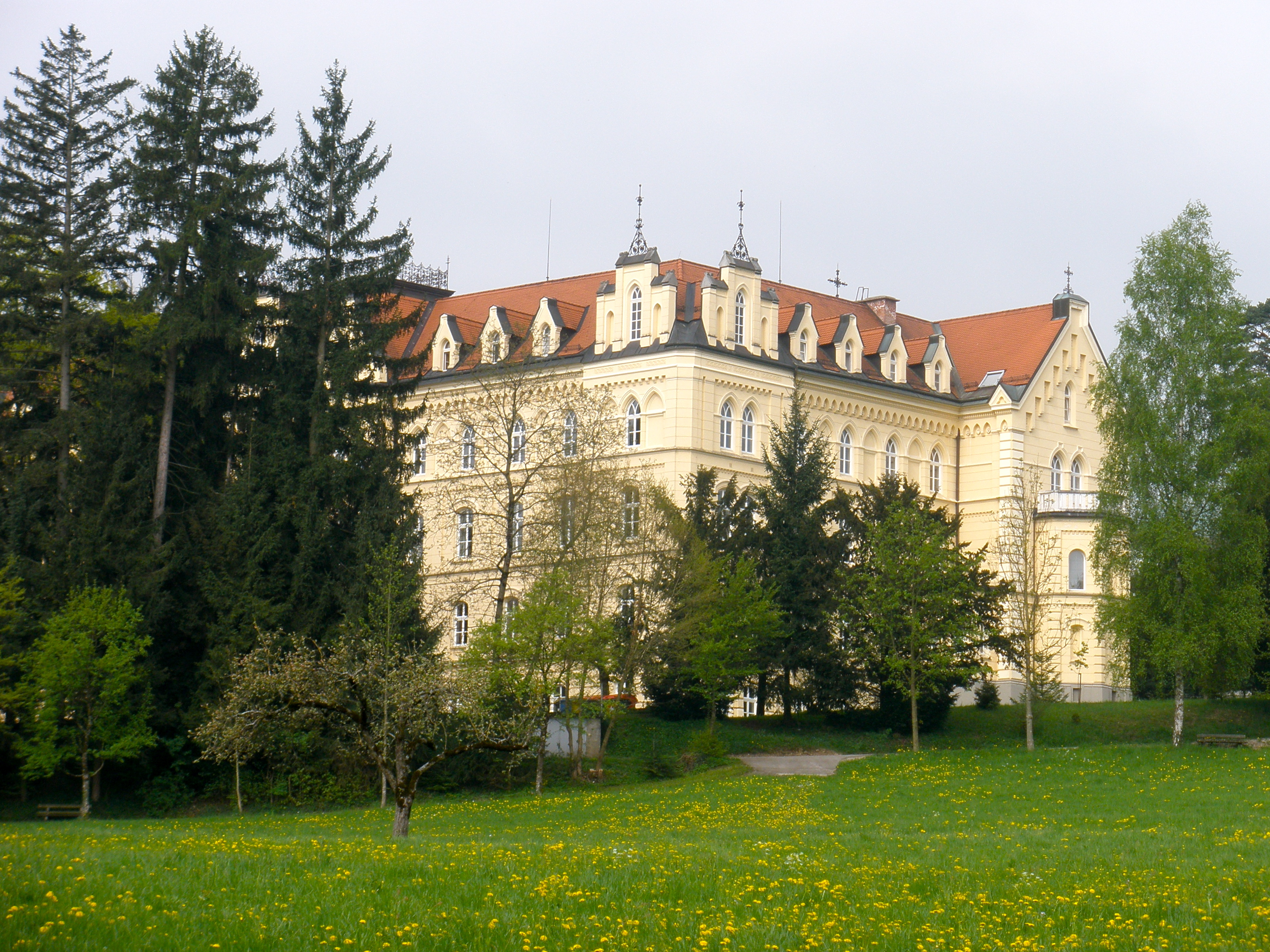 Das ehemalige " Mädchenpensionat der Kreuzschwestern" in Gmunden – erbaut in den Jahren 1890 bis 1892 – trägt heute die Bezeichnung "Gymnasium ORG Ort". Träger ist der "Schulverein der Kreuzschwestern".